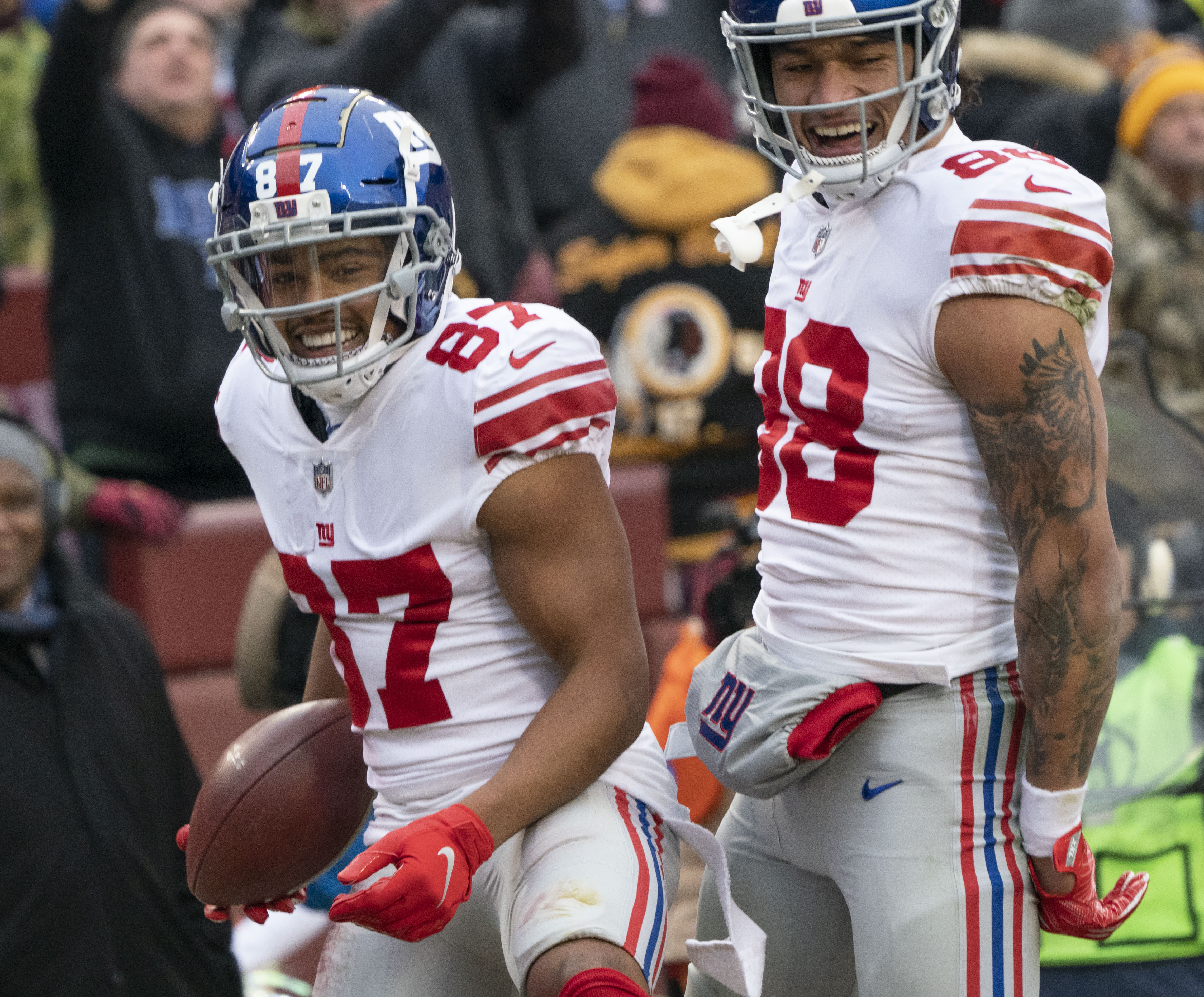 Giants at Redskins 12/09/18